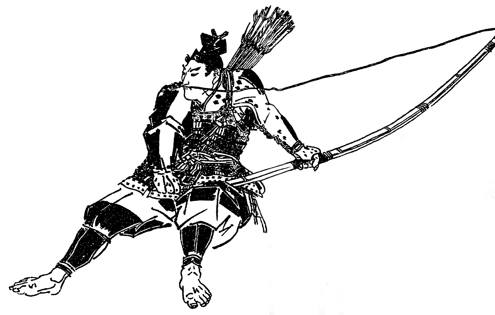 喜三太。『義経記』に登場する源義経の郎党。／江戸時代『前賢故実』より。画：菊池容斎